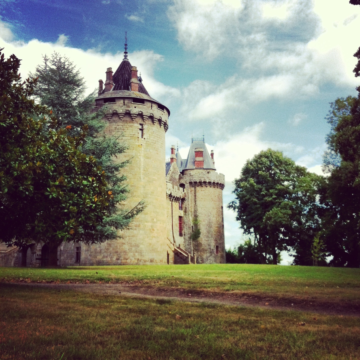 Château de Combourg (inscriptionclassement (partiel)) .